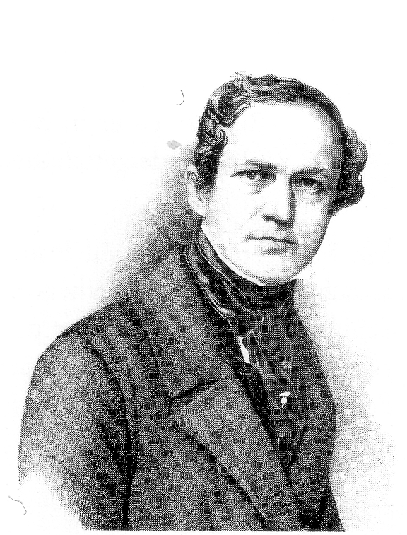 Adolph Goeden (1810-1888), Abgeordneter der Paulskirche